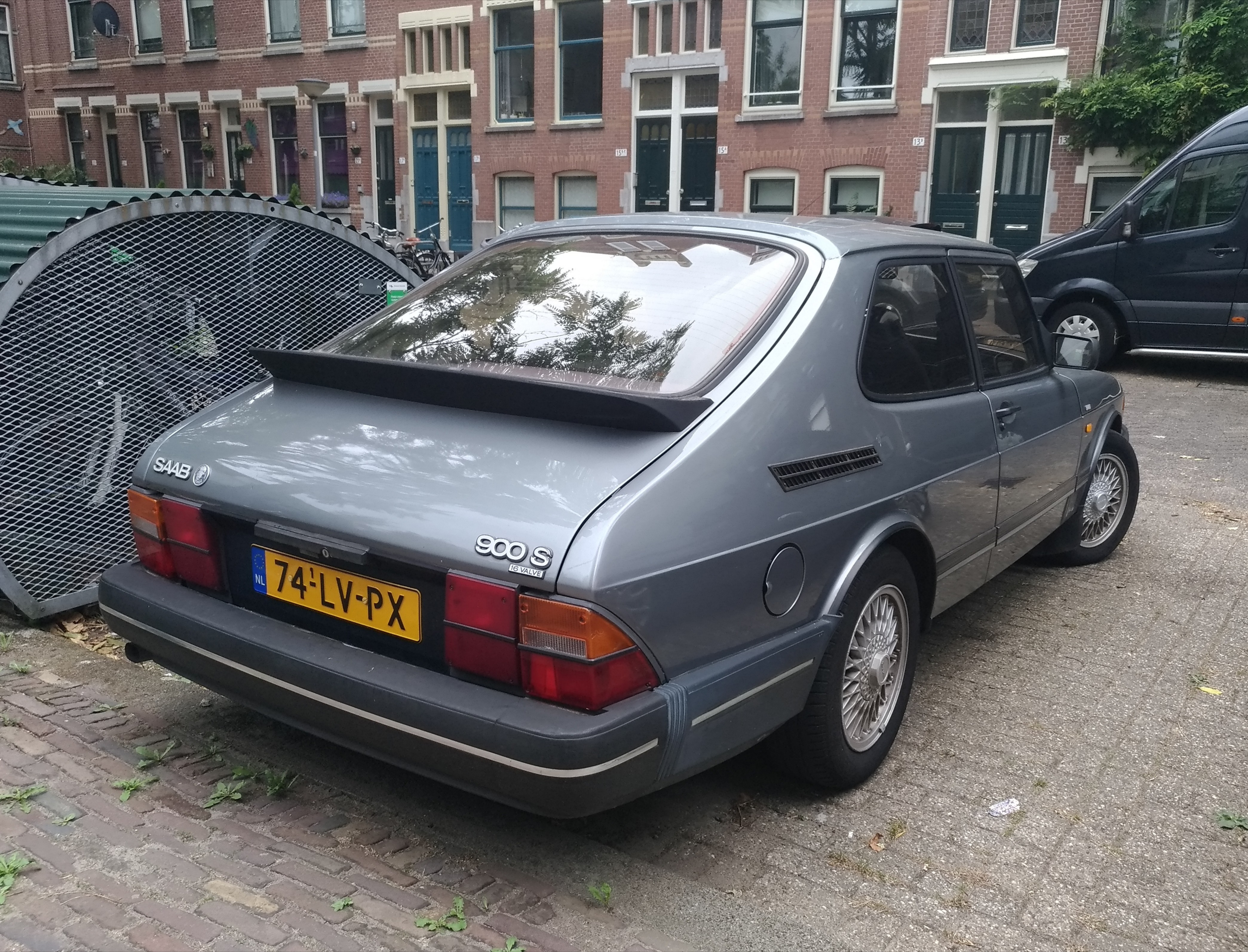 1990 Saab 900 S (2.0 141 hp) at Rotterdam